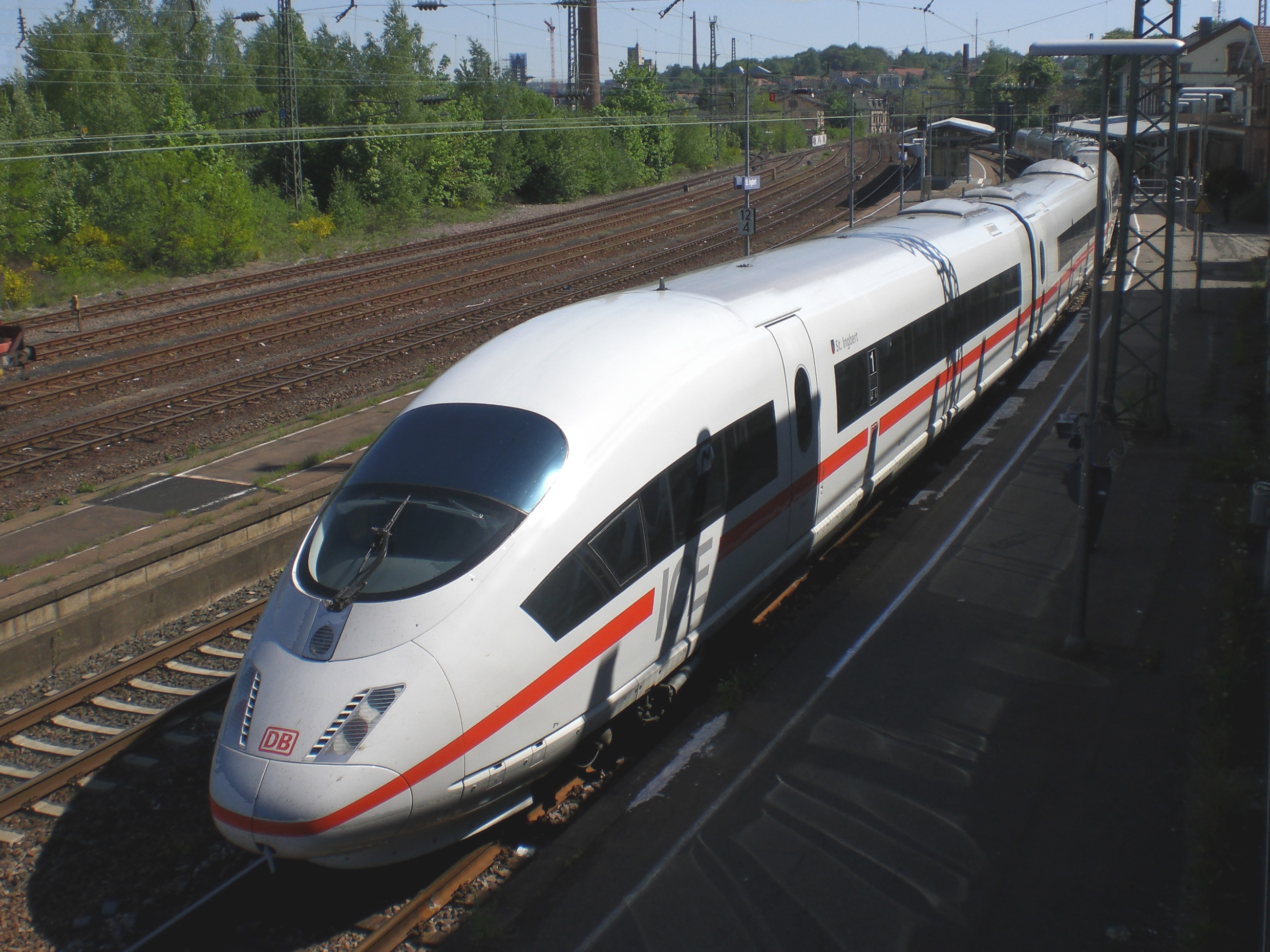 ICE St. Ingbert, Taufe am 10.05.2008